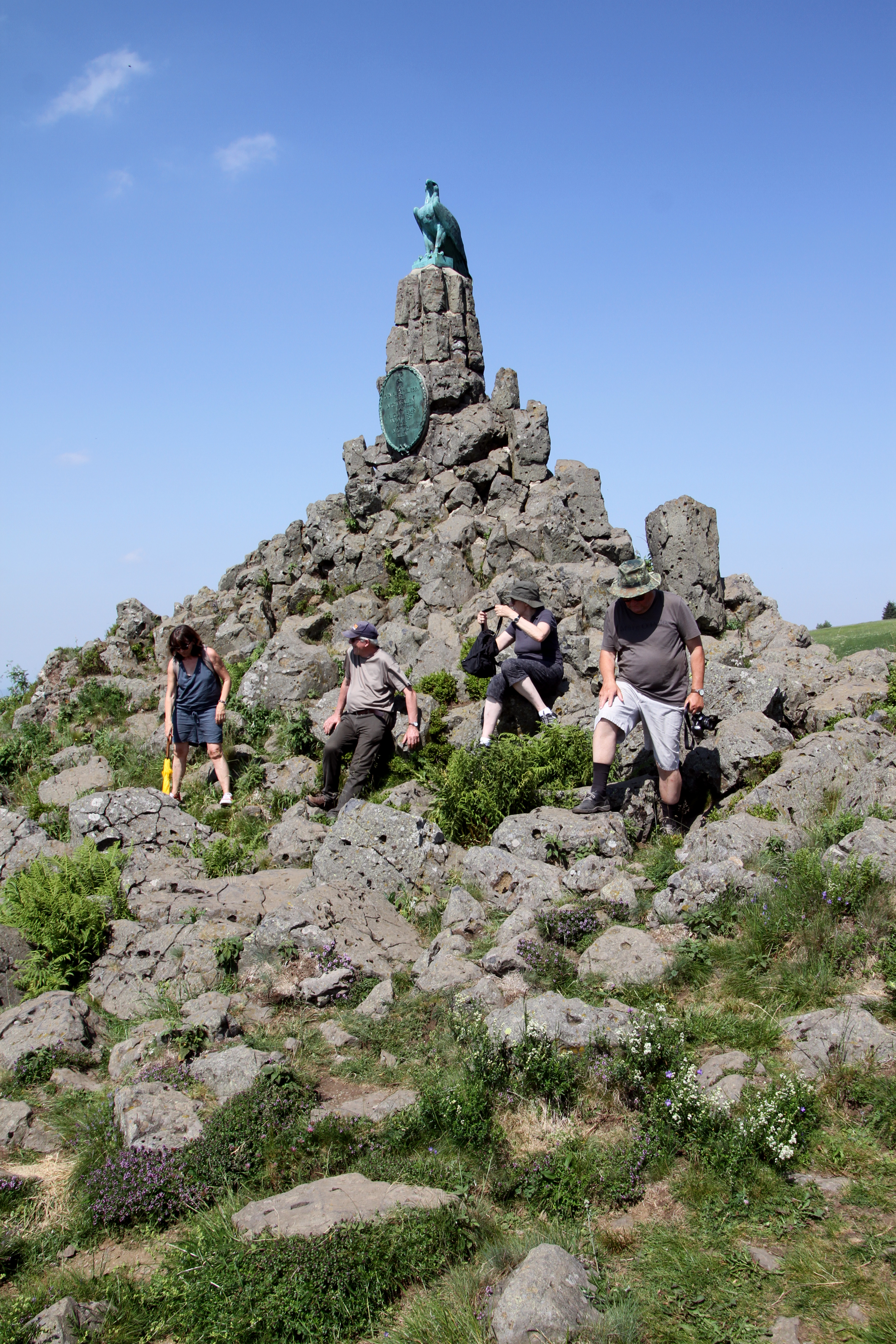 Wasserkuppe in der Rhön in Hessen